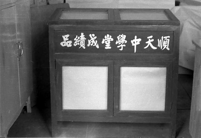 顺天中学成绩柜